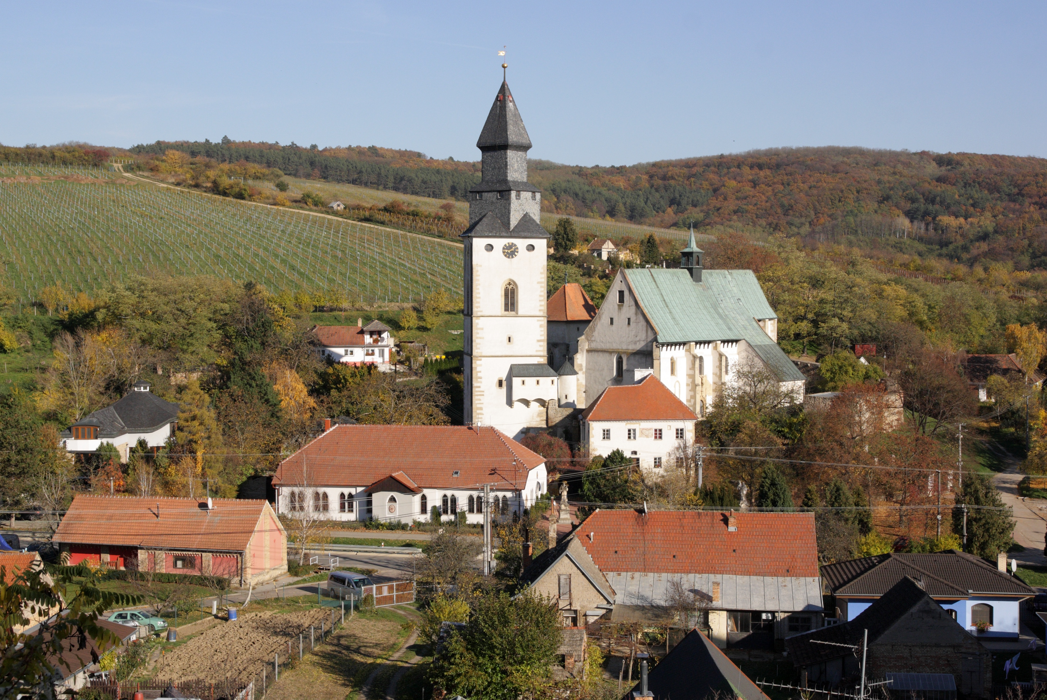 Kurdějov - kostel svatého Jana Křtitele, pohled od západu.